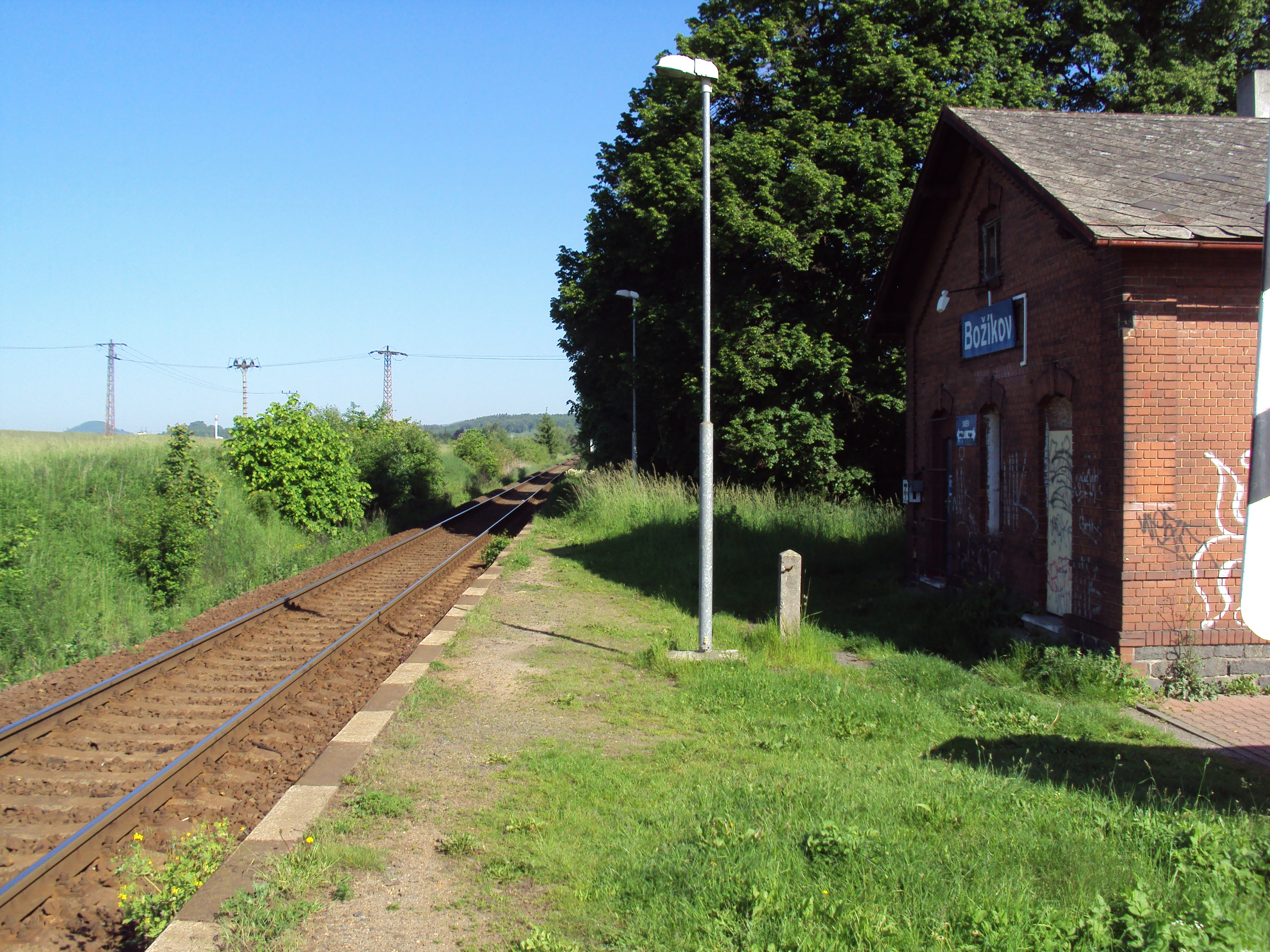 Železniční zastávka Zákupy - Božíkov na trati z Liberce do České Lípy